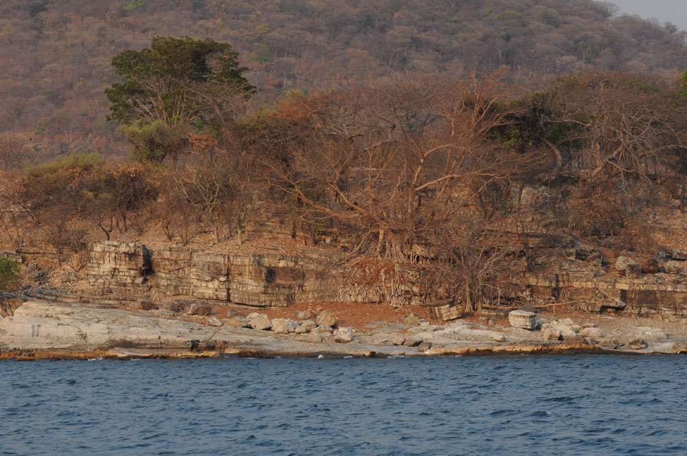 Strates le long des rives de la fosse d'effondrement du lac Tanganyika.